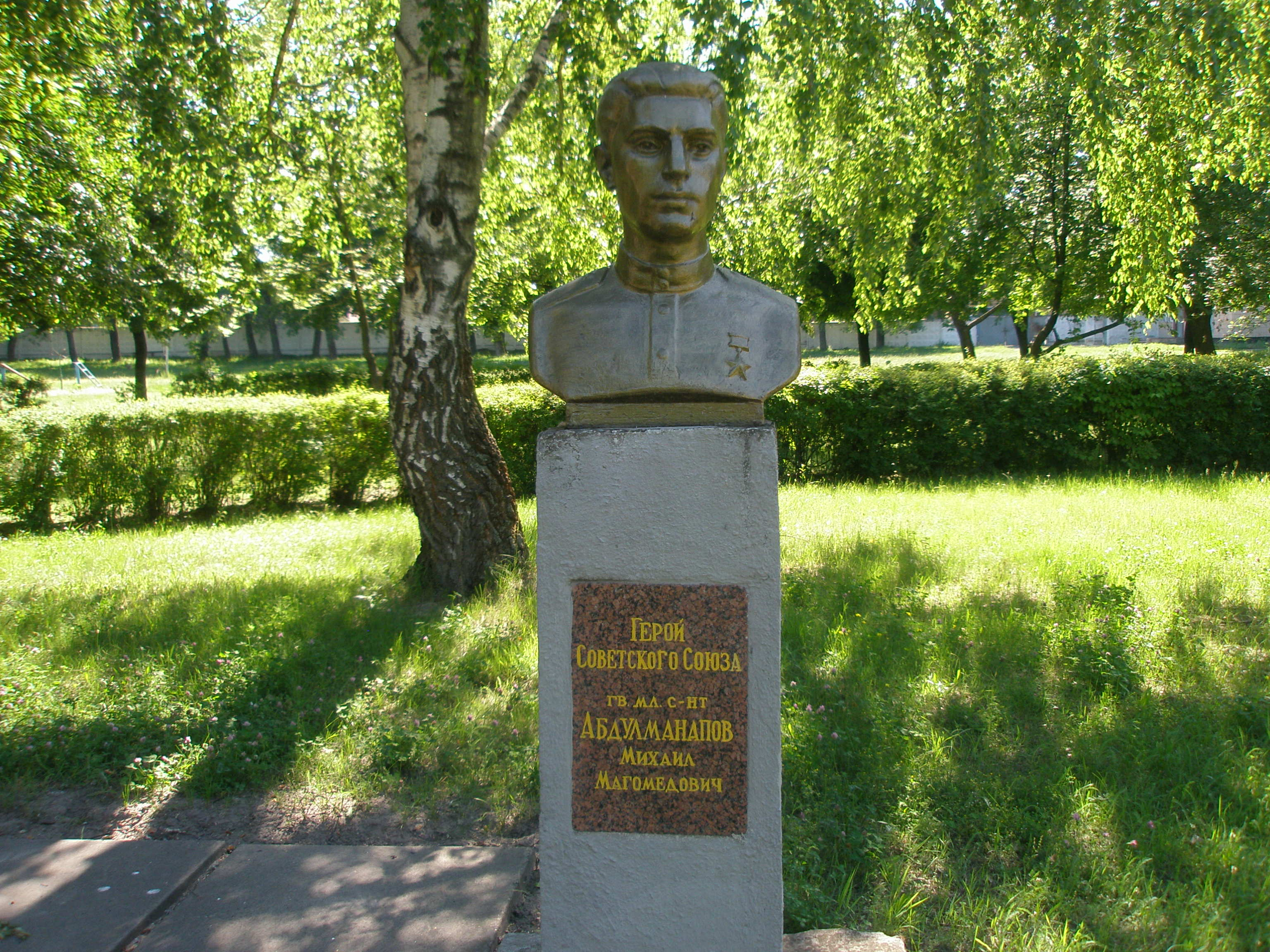 бюст гвардии младшего сержанта Абдулманапова Михаила Магомедовича, Героя Советского Союза